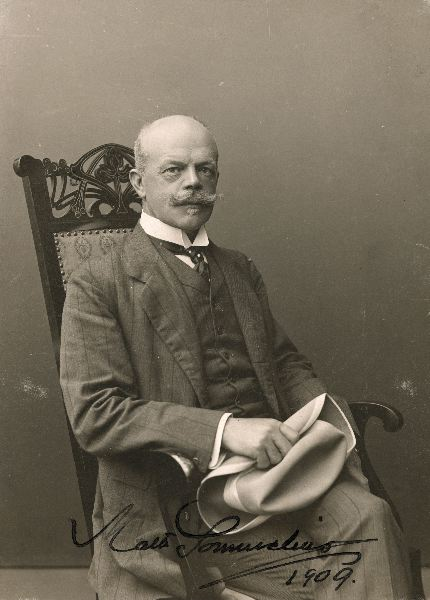 Malte Sommelius